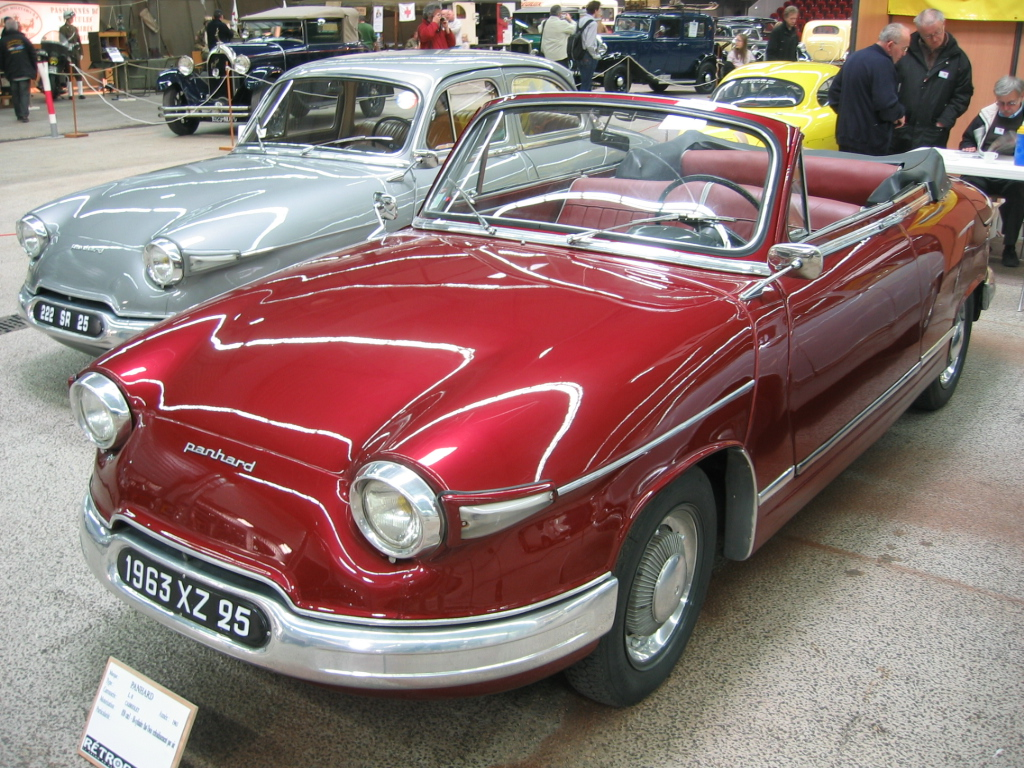 Panhard PL17